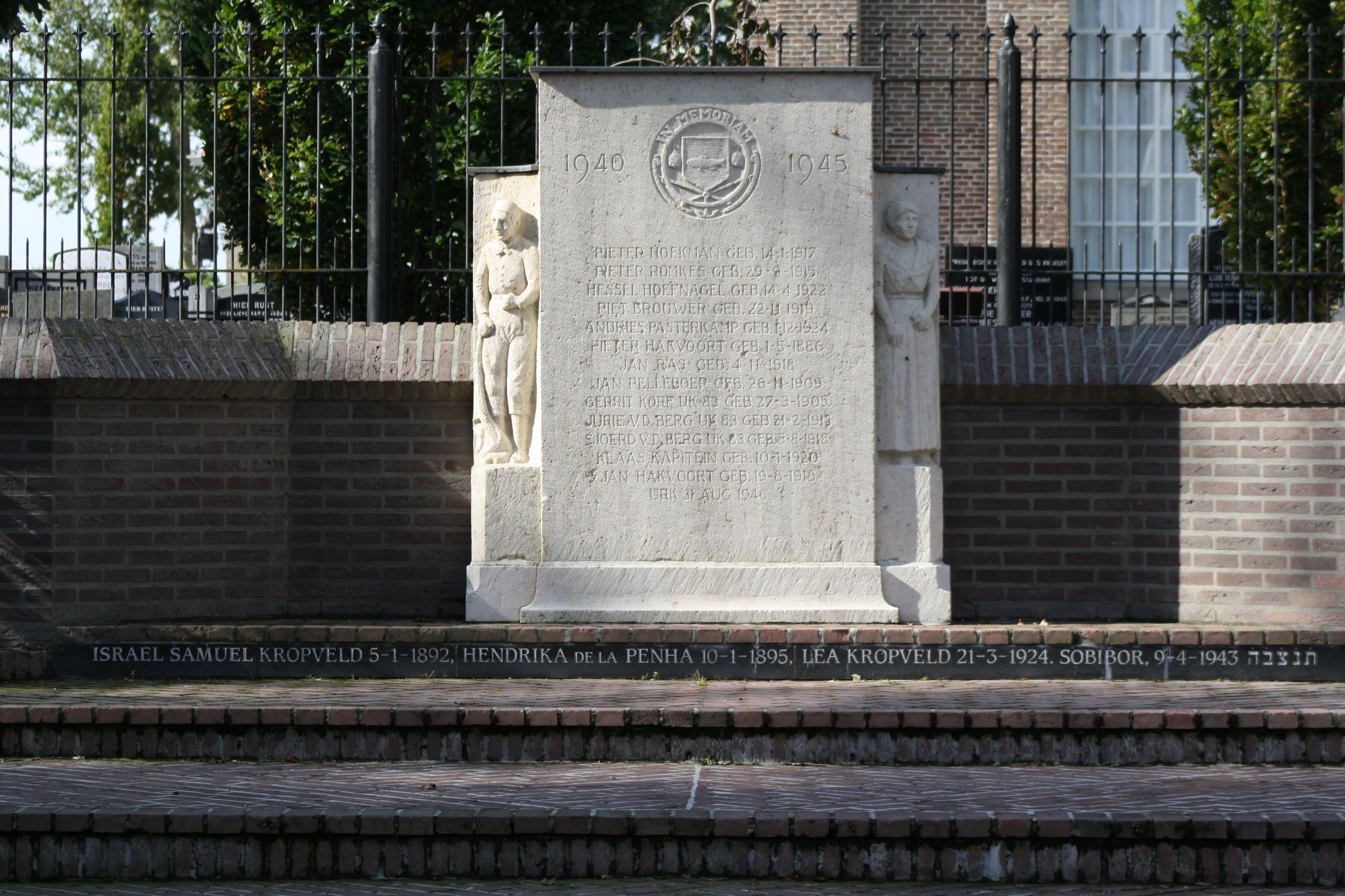 Urk - Oorlogsmonument